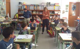 Irene Rigau, Consellera d'Educació de la Generalitat de Cataluna durant la visita als centres educatius de Falset.